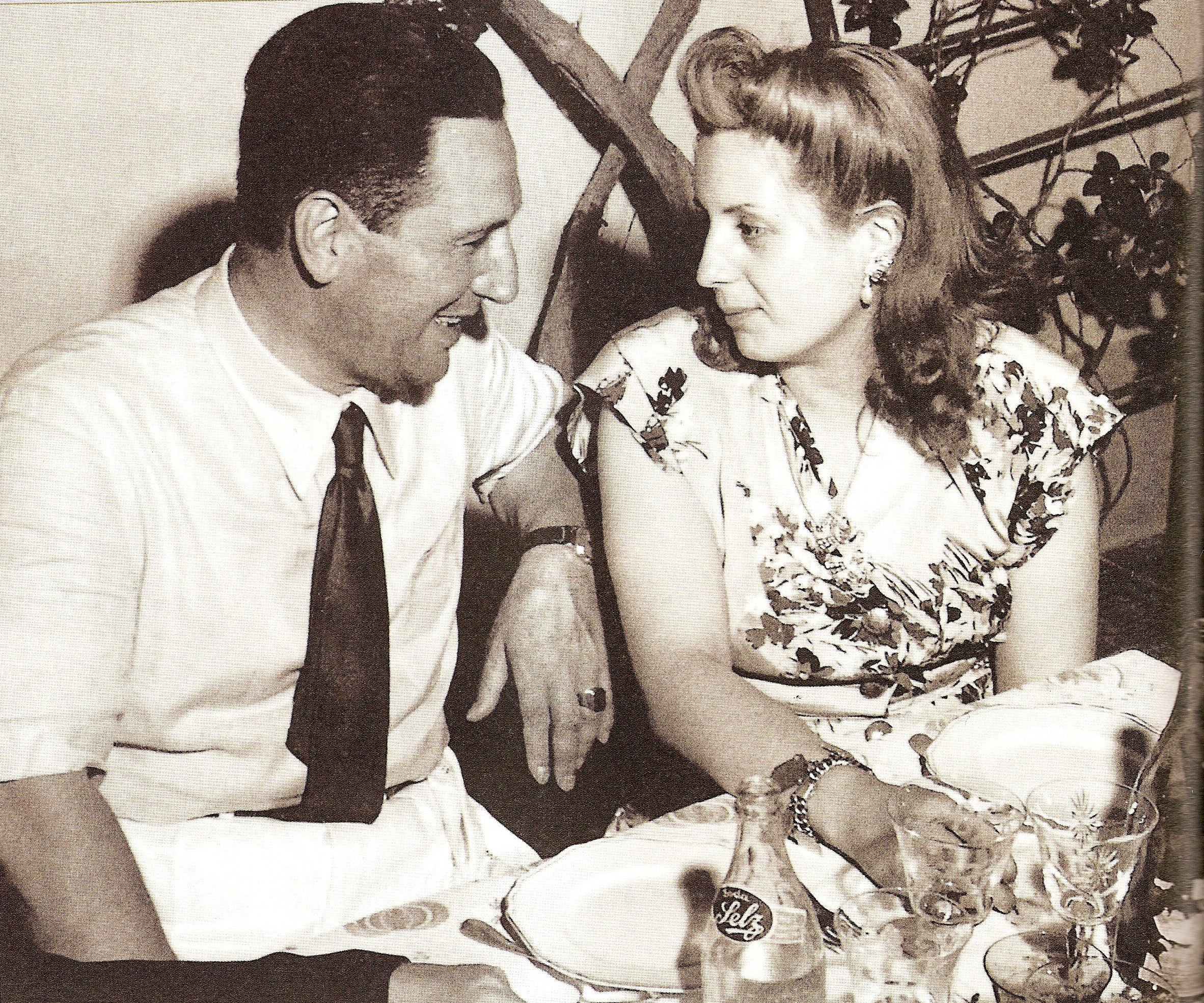 Evita y Perón celebran el año nuevo en Santiago del Estero